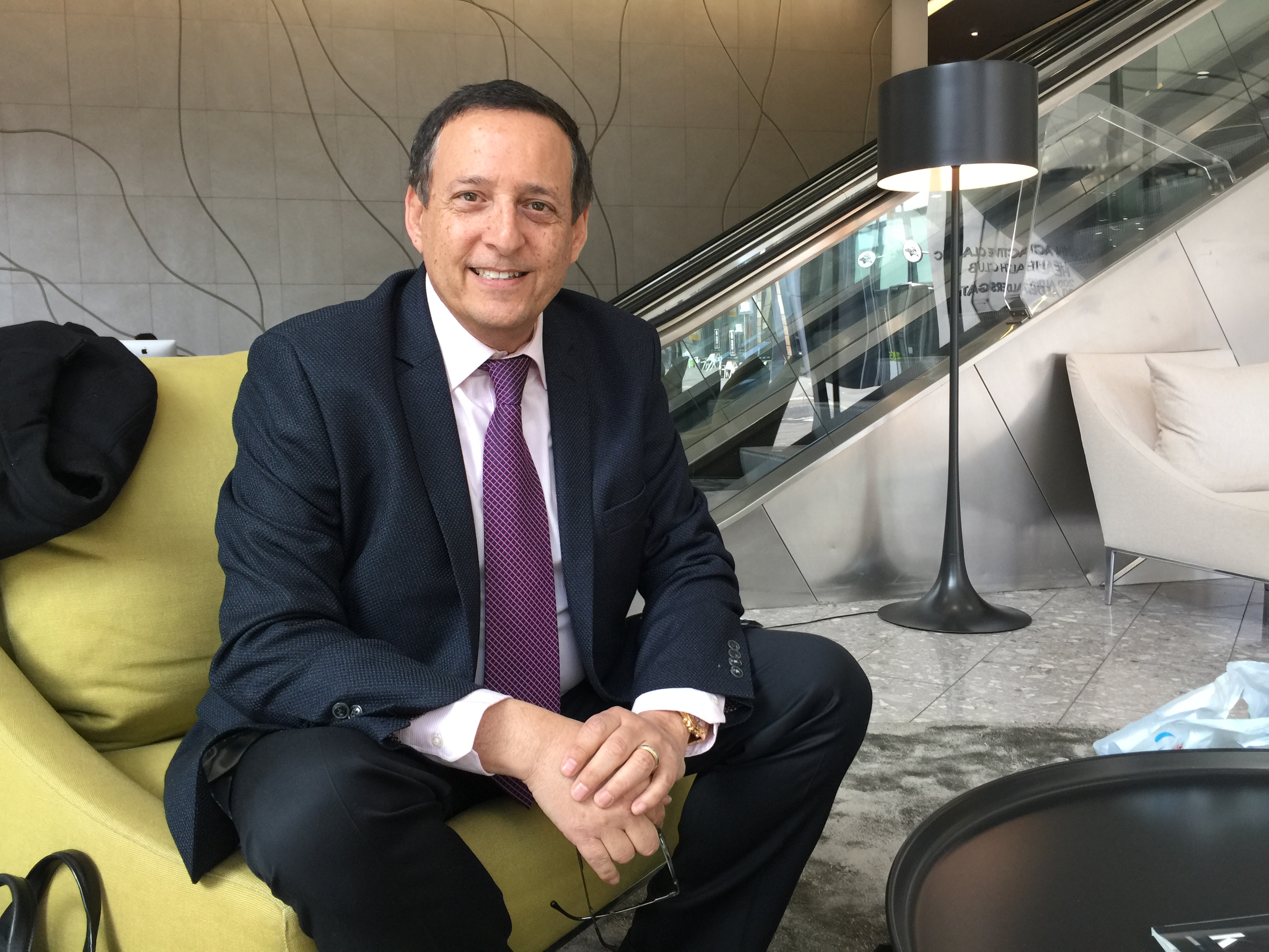 משה מנו